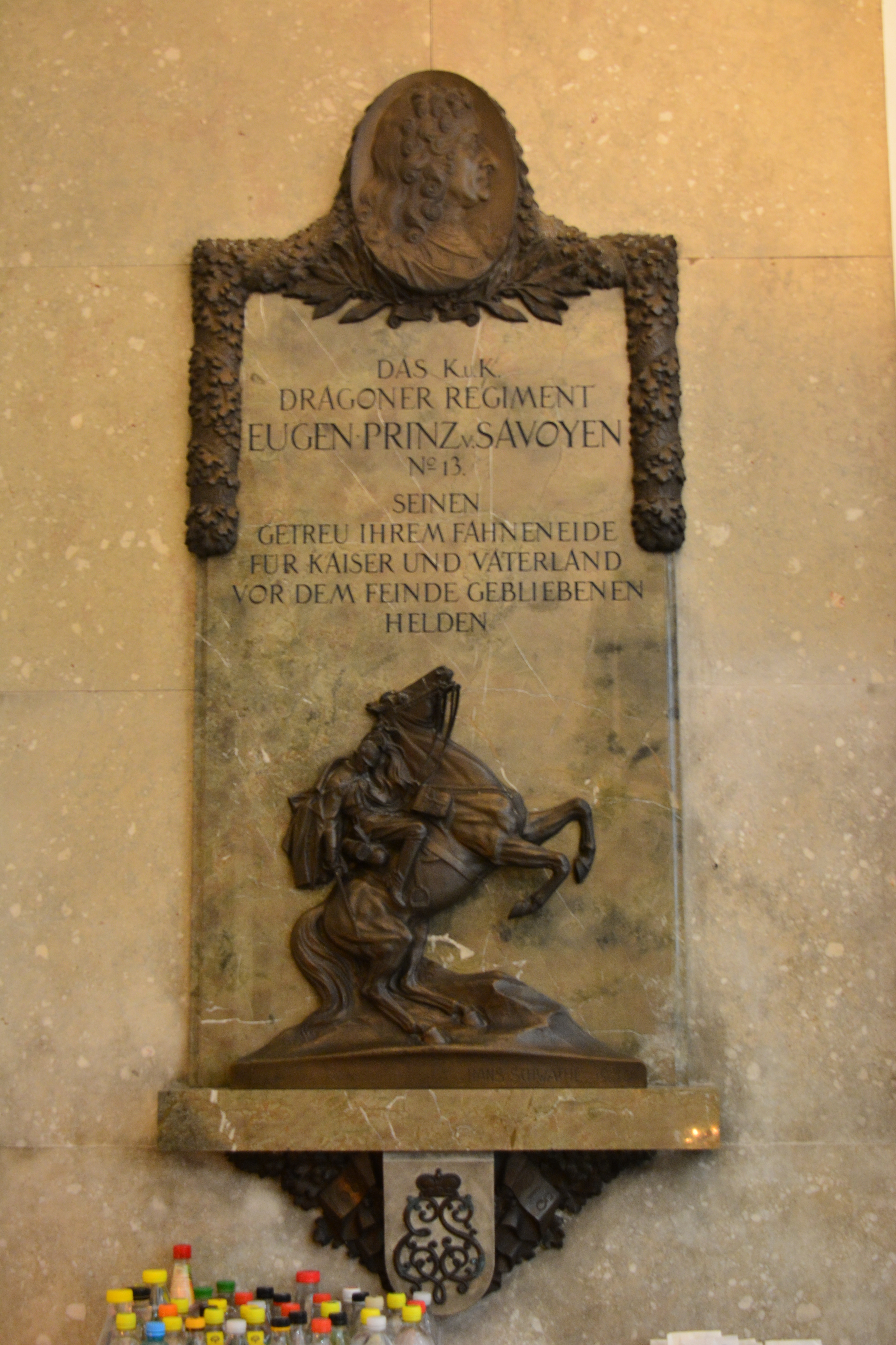 Gedenktafel für das k.u.k. Dragonerregiment Nr. 13 (Wien, Neuer Markt, Kapuzinerkirche)